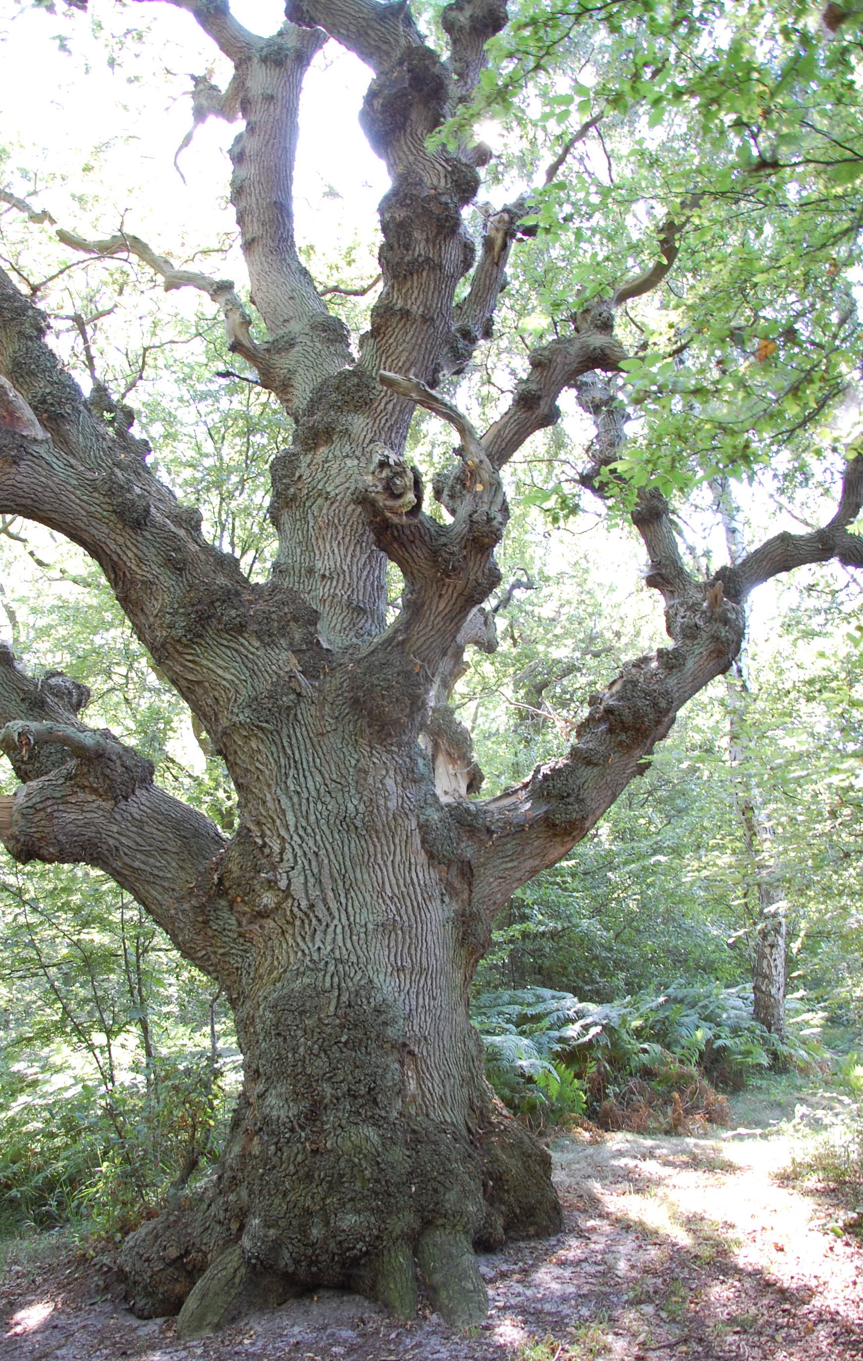 Vilm alter Baum Nordwestufer